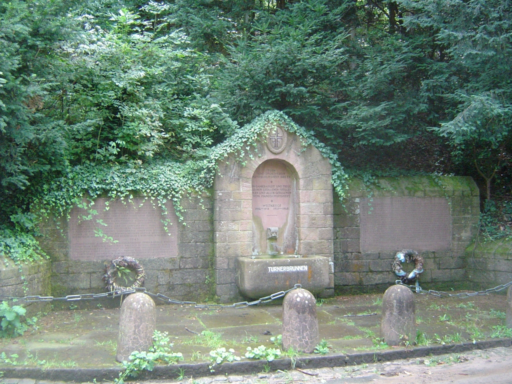 Turnerbrunnen in Heidelberg-Handschuhsheim